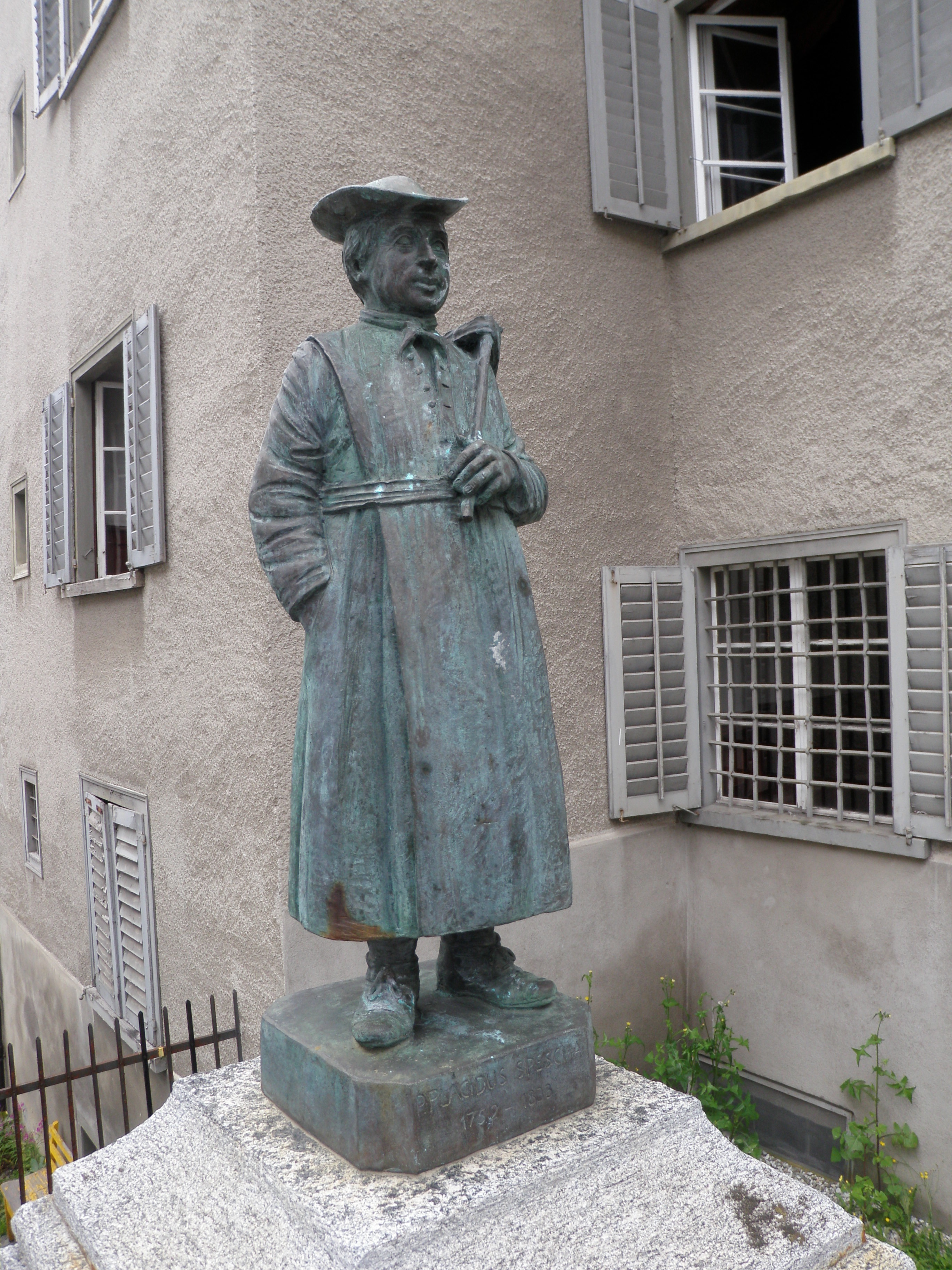 Denkma vonl